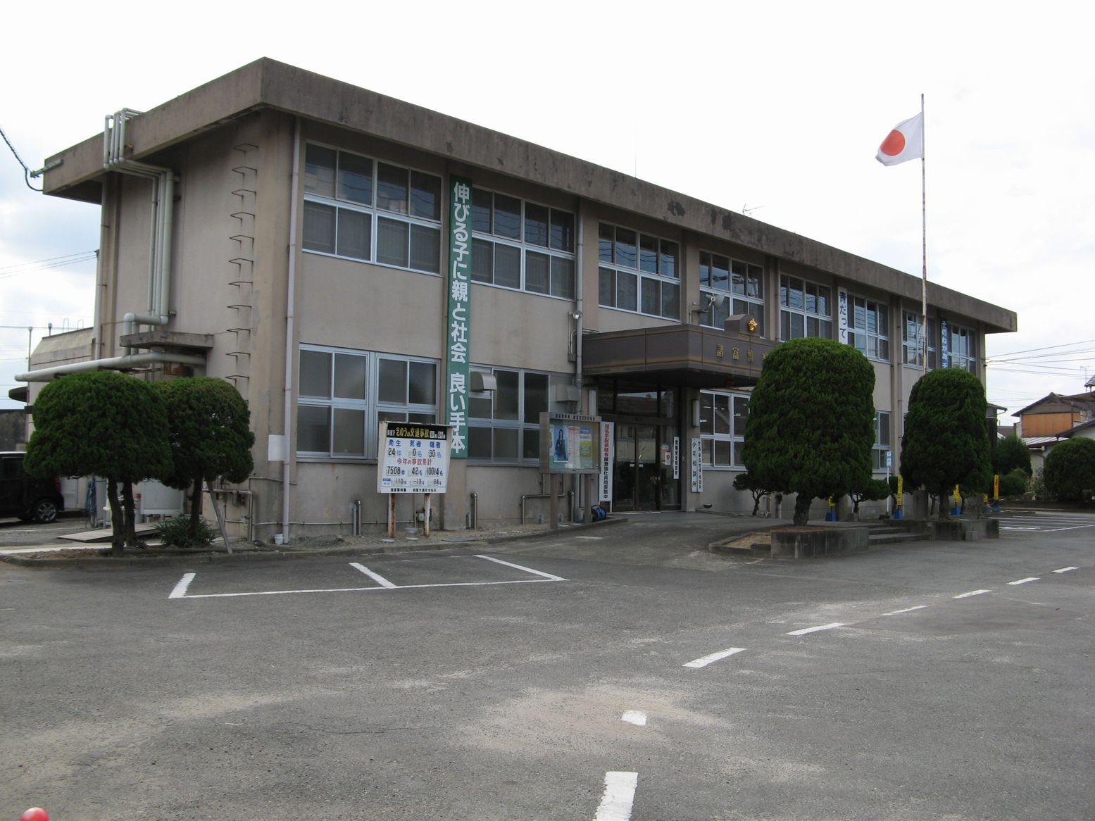 諸富警察署